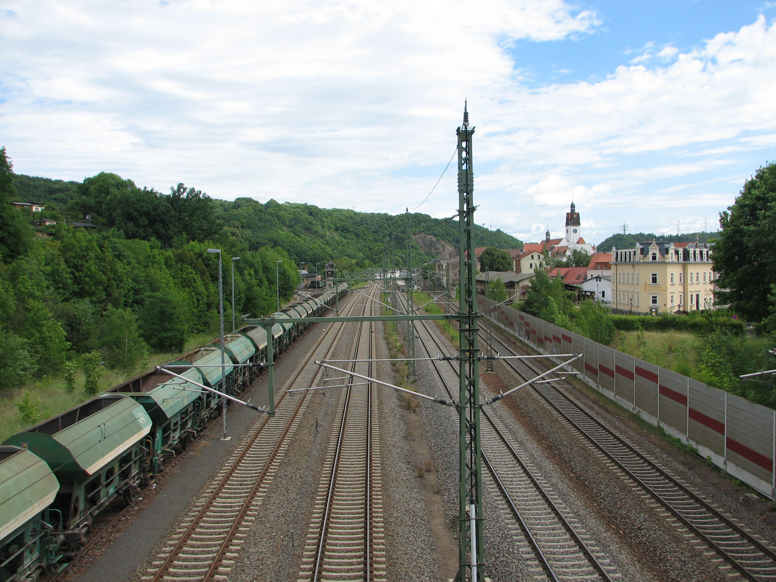 Blick von einer Fußgängerbrücke auf die Anlagen der Bahnstrecke Dresden-Werdau (Albertbahn) in Richtung Dresden. Im Hintergrund ist das Rathaus Potschappel zu erkennen.